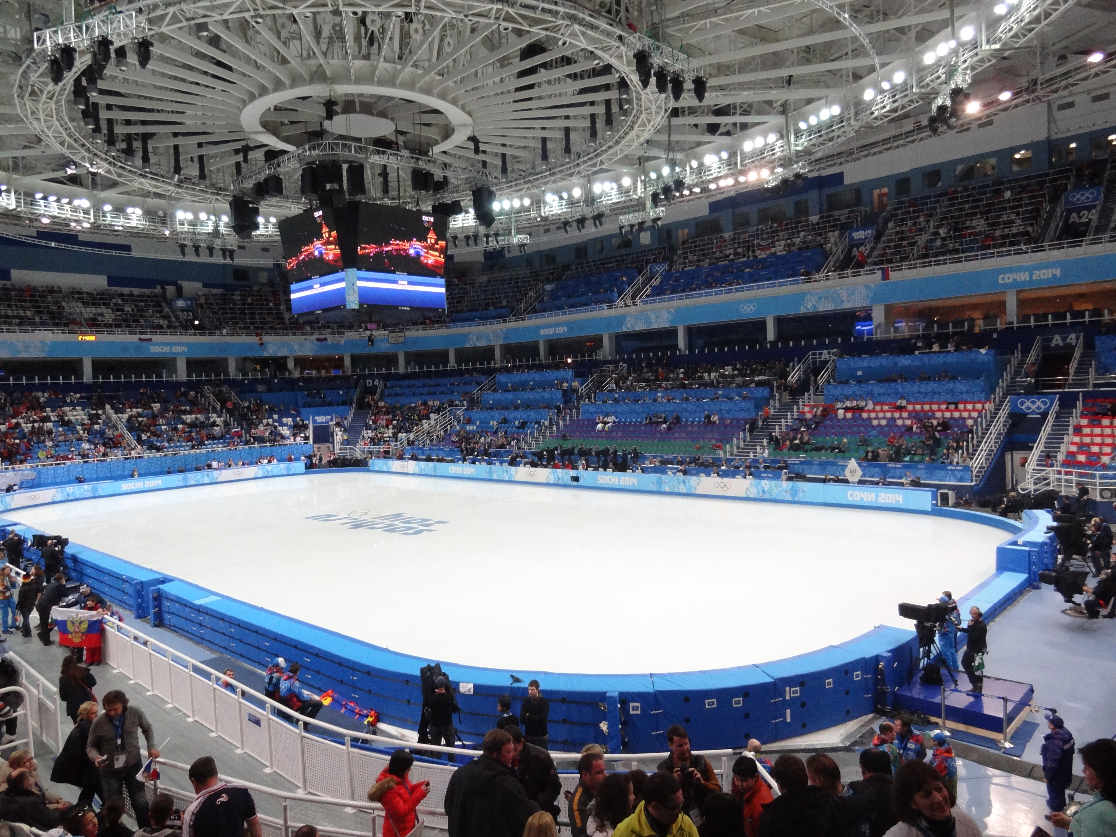 Дворец зимнего спорта «Айсберг» — ледовый дворец спорта на 12 000 мест в Адлере, Сочи, с ледовой ареной (60×30 м)